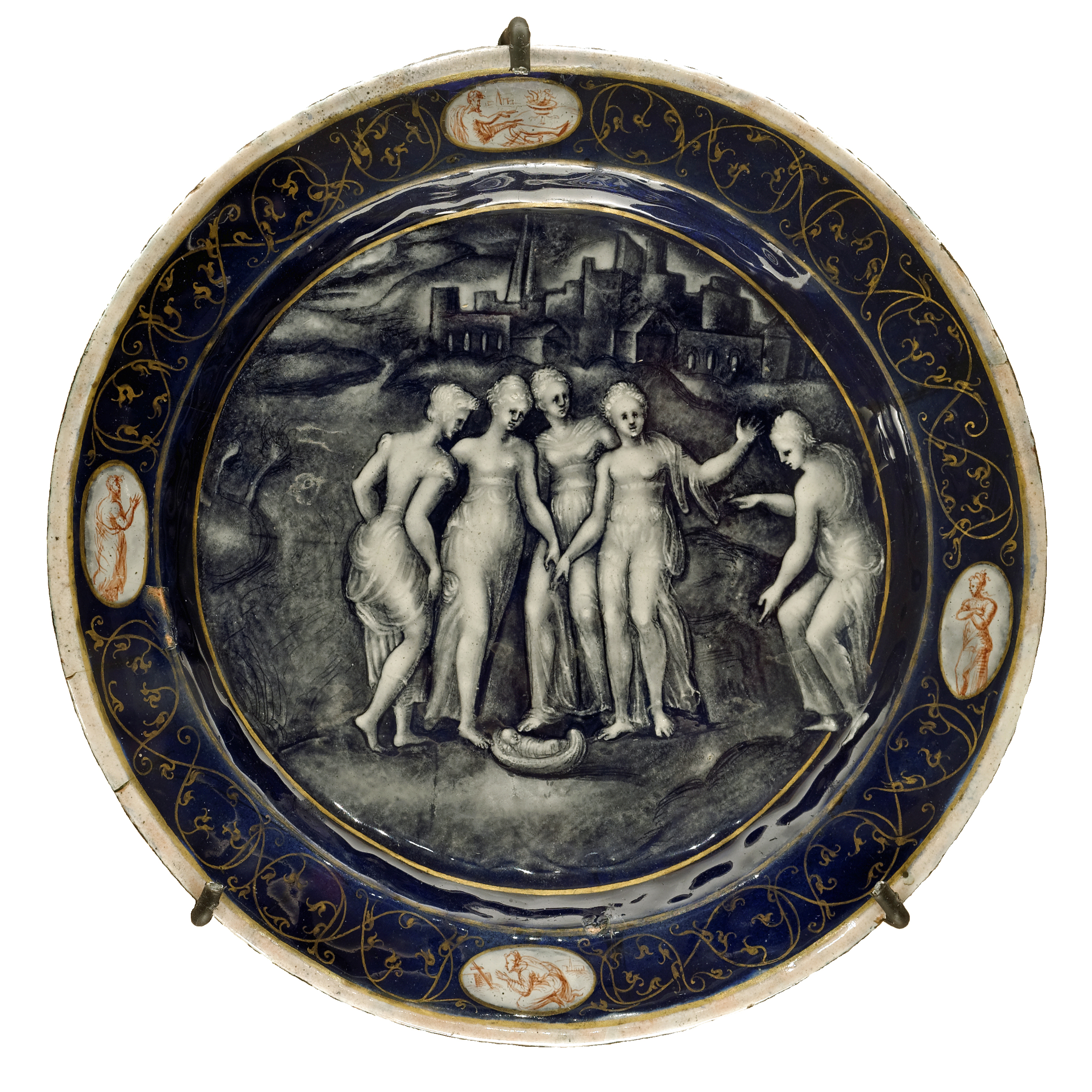 Assiette : La Découverte du berceau de Moïse, d’après Bernard Salomon, vers 1560. Émail peint sur cuivre.